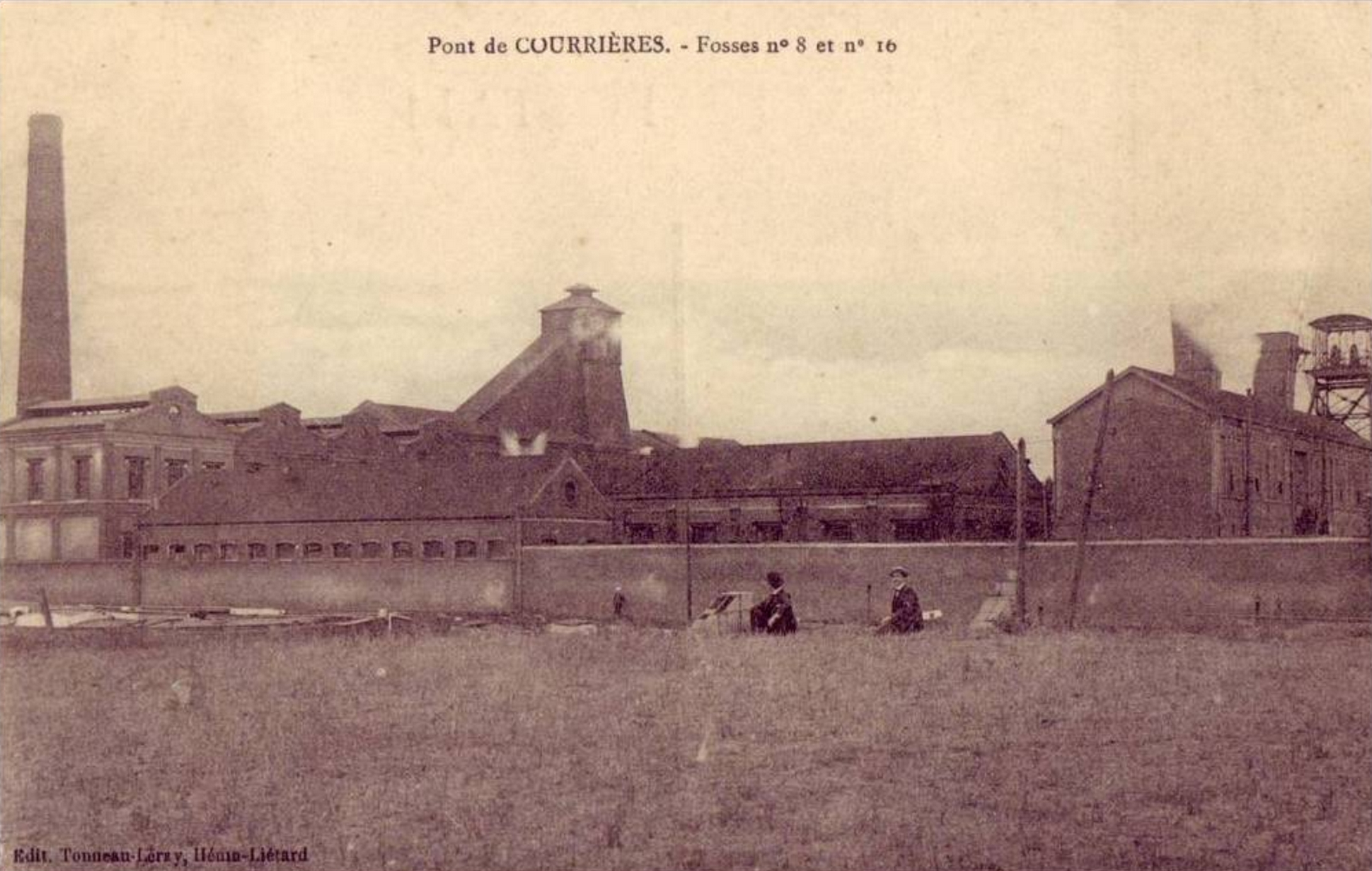 La fosse n° 8 - 16 dite Gabriel Portier de la Compagnie des mines de Courrières était un charbonnage constitué de deux puits situé à Courrières, Pas-de-Calais, Nord-Pas-de-Calais, France.